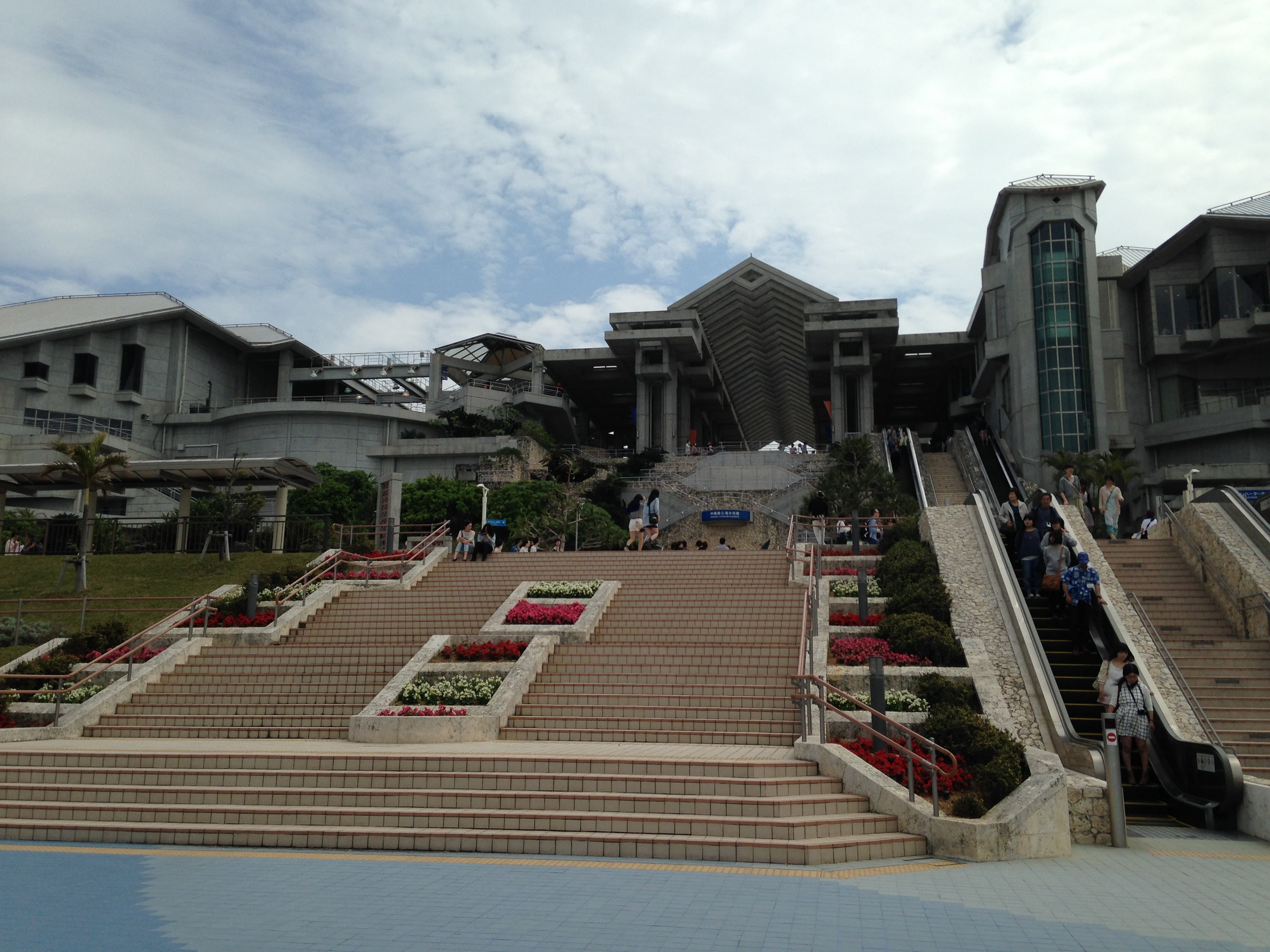 西側より望む沖縄美ら海水族館